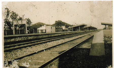 曹甬铁路慈溪站（今慈城站）